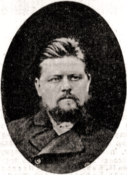 Leontij Fëdorovič Berdnikov